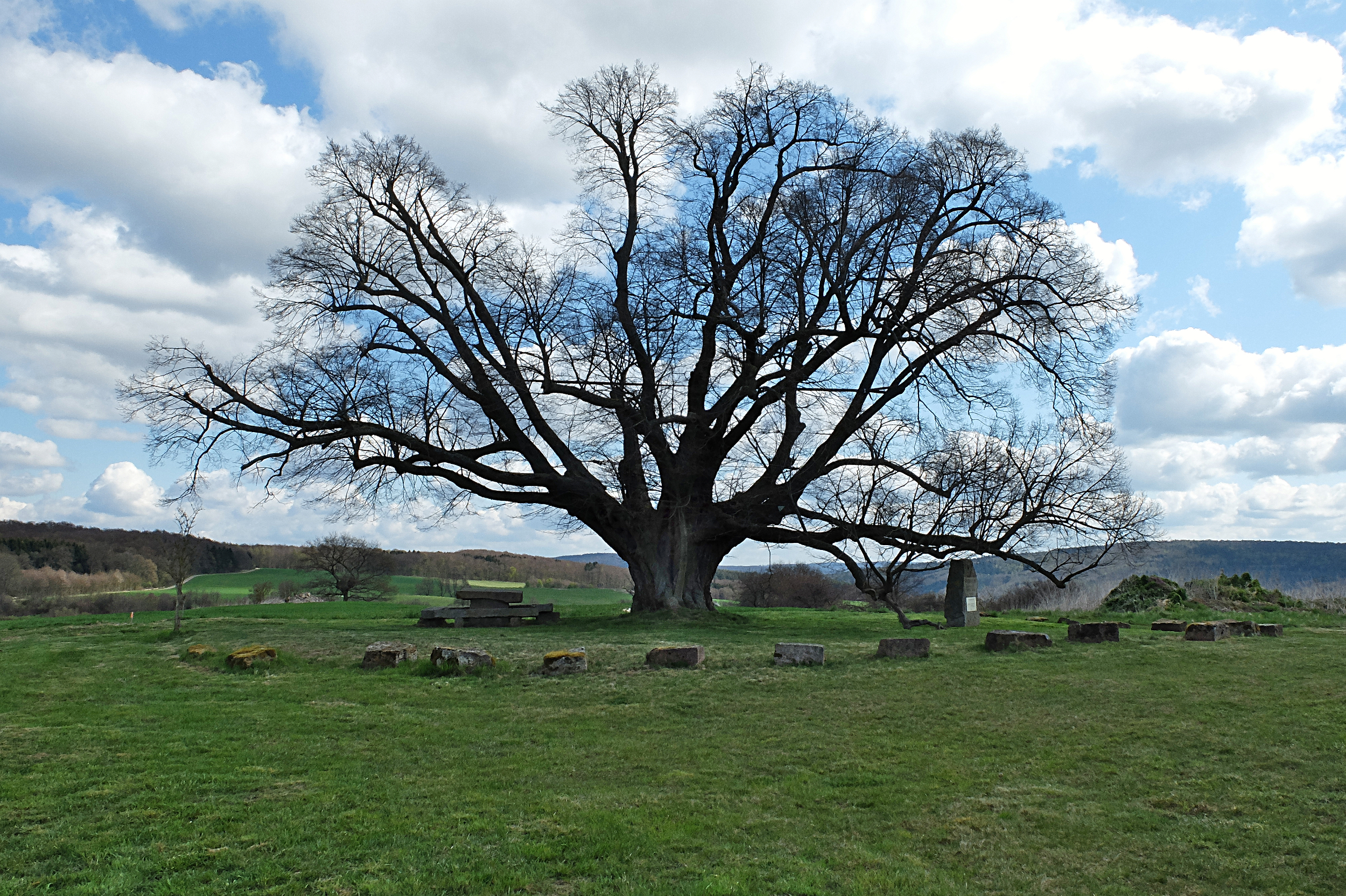 Naturdenkmal Sipperhäuser Linde in 34323 Malsfeld (Ortsteil Sippershausen), Schwalm-Eder-Kreis, Hessen. Die Linde steht östlich von Sippershausen auf einem Hügel vor dem Sportplatz.